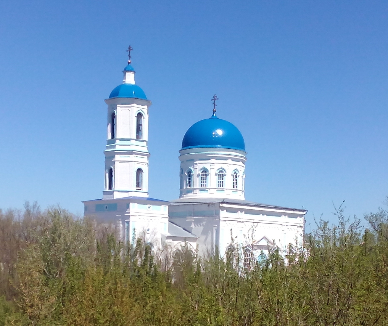 Алексеевка. Церковь Казанской иконы Божией Матери